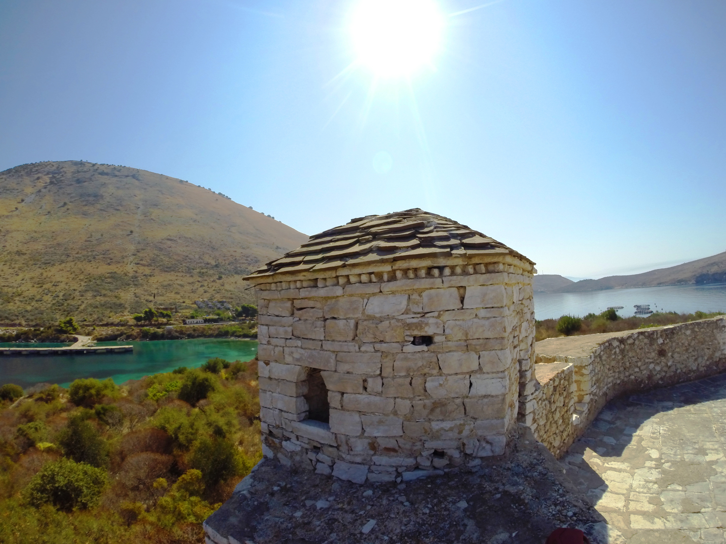 Kalaja E Porto Palermos